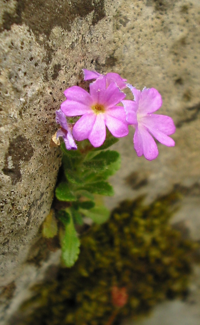 Erinus alpinus, Jardin alpin, Jardin des Plantes de Paris